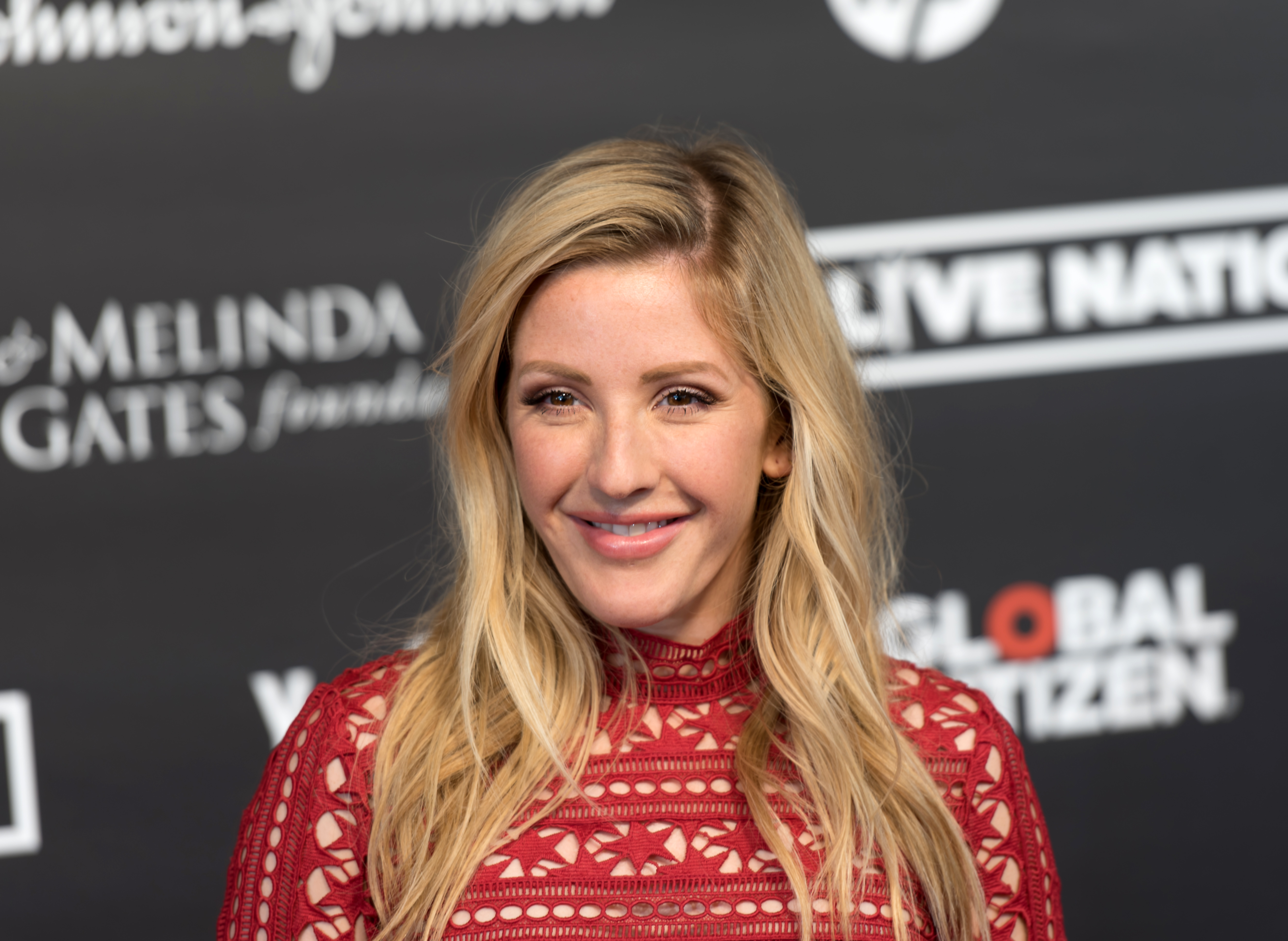 Ellie Goulding beim Global Citizen Festival in Hamburg